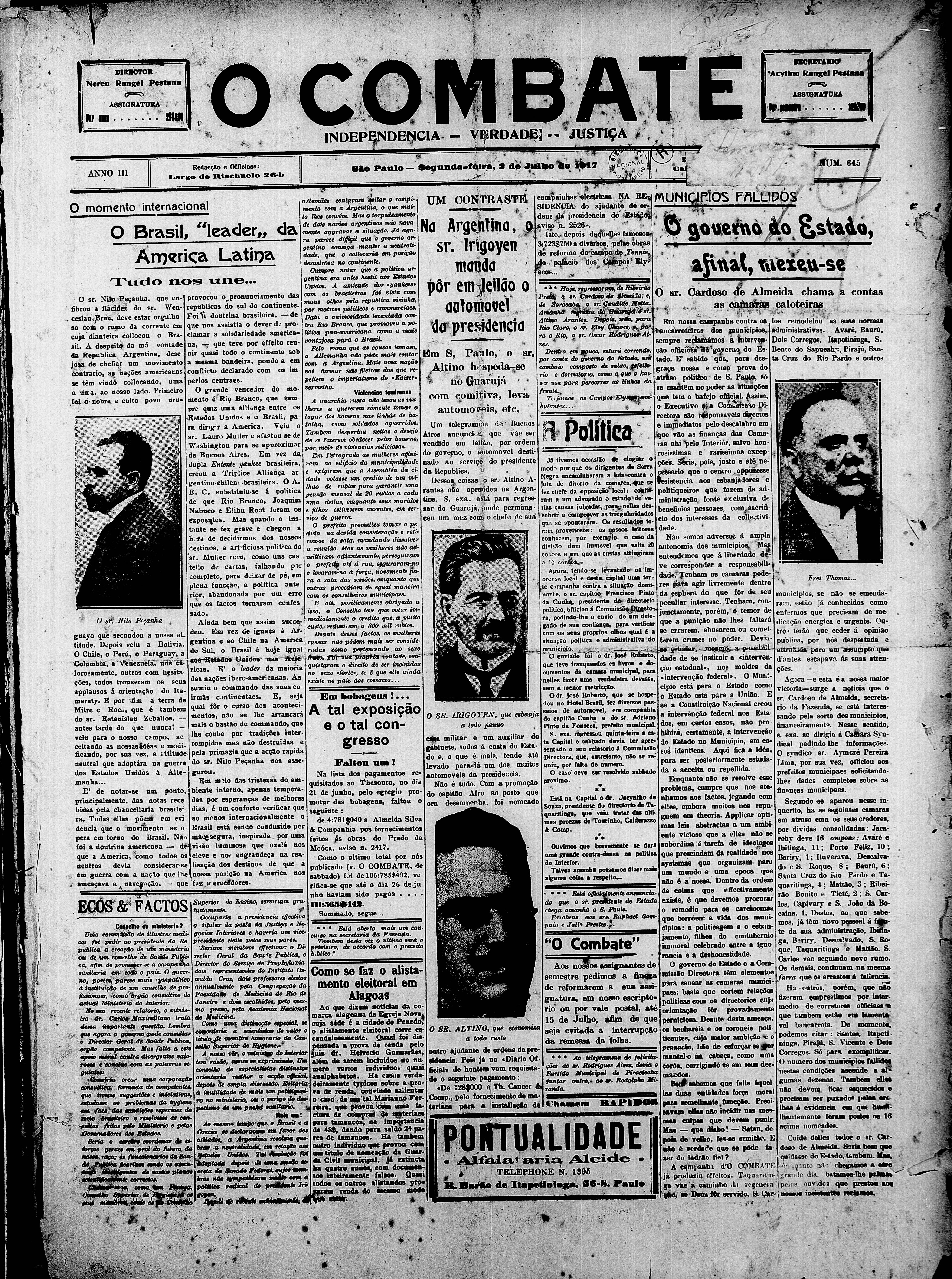 Primeira página do jornal O Combate, edição 645.